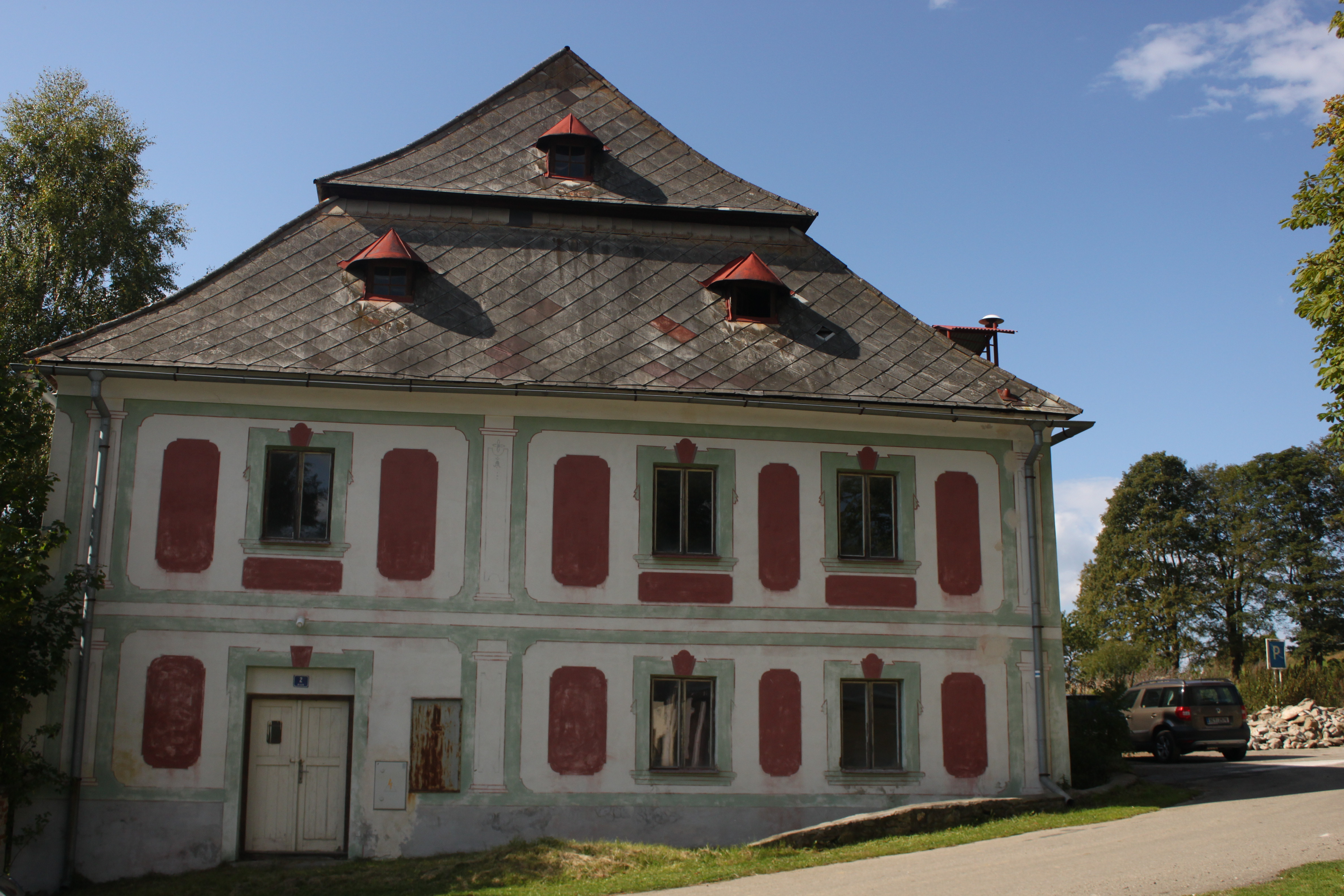 Dům v obci Nicov (poblíž hřbitovního kostela), okres Prachatice